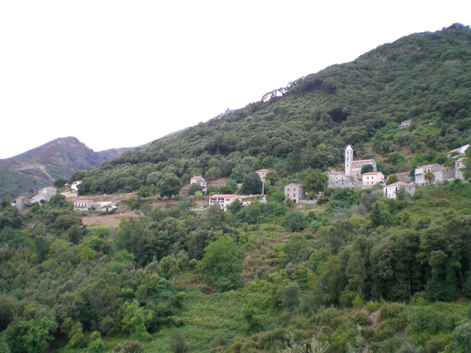 village Loreto di Tallano